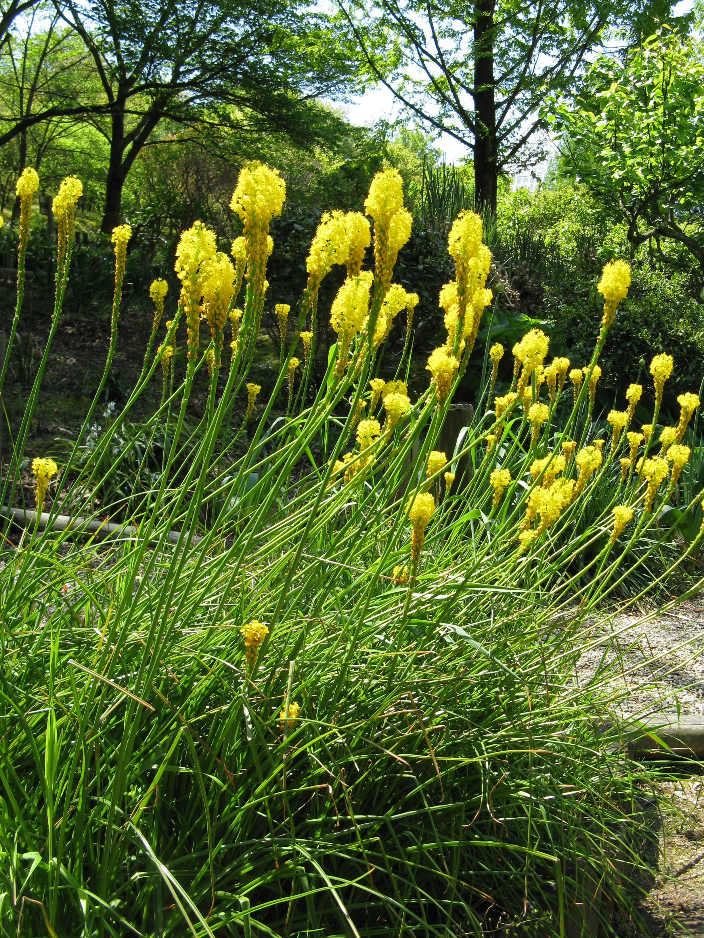 Bulbinella triquetra Place:Osaka Prefectural Flower Garden,Osaka,Japan